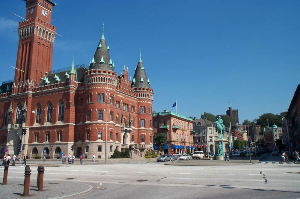 Beschreibung: Rathaus und Kärnan in Helsingborg, Schweden Quelle: Selbst fotografiert, 20. August 2002 Lizenzstatus: Public Domain